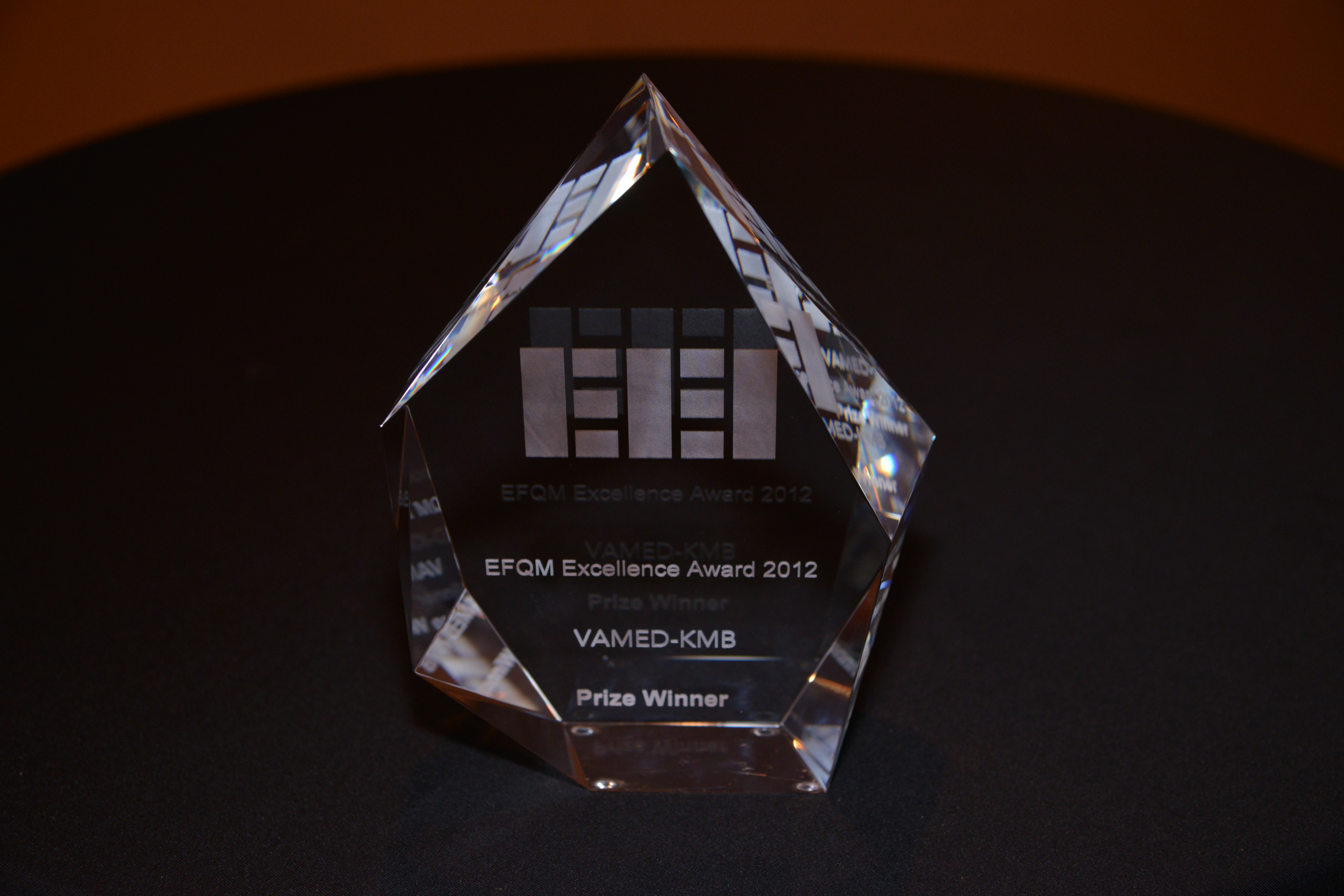 VAMED als "Prize Winner" im EFQM Excellence Award 2012 für "Kreativität & Innovation fördern"